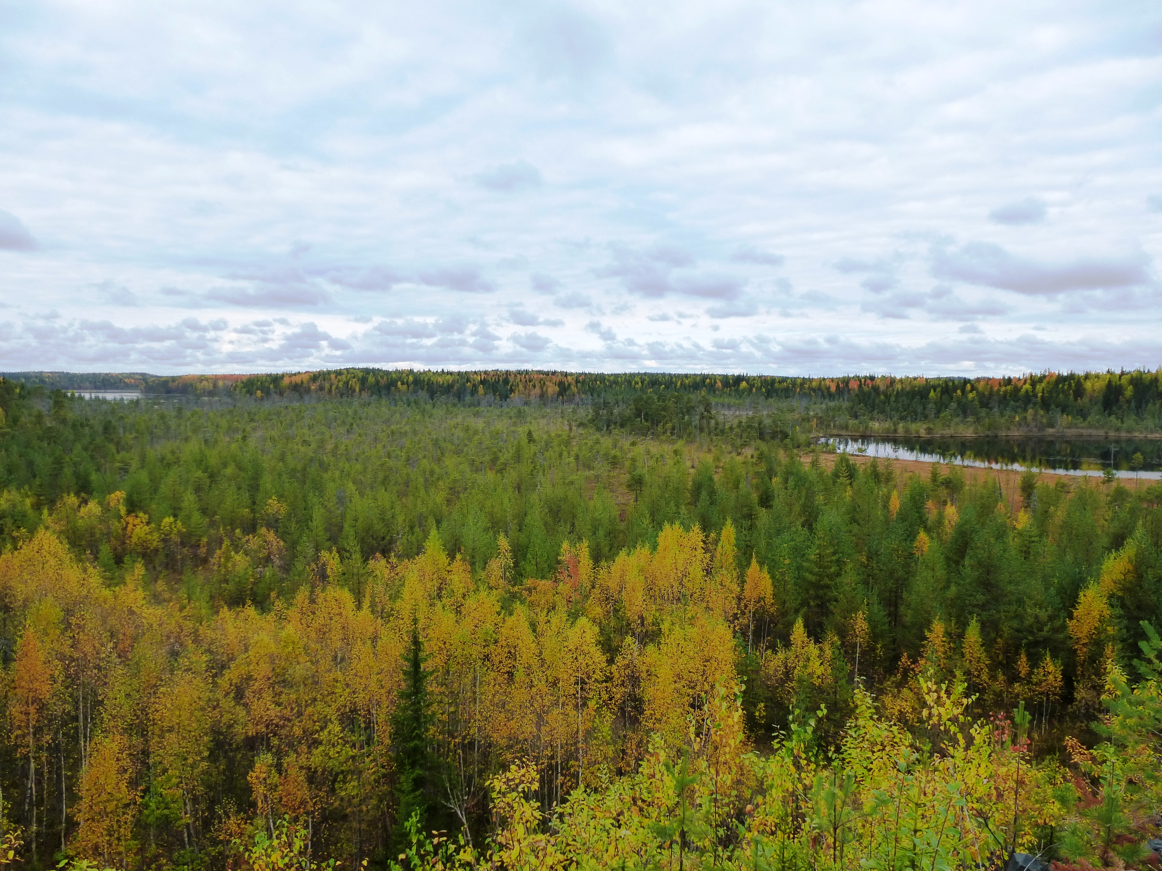 Панорама лесов Карелии. Медвежьегорский район Республики Карелия.